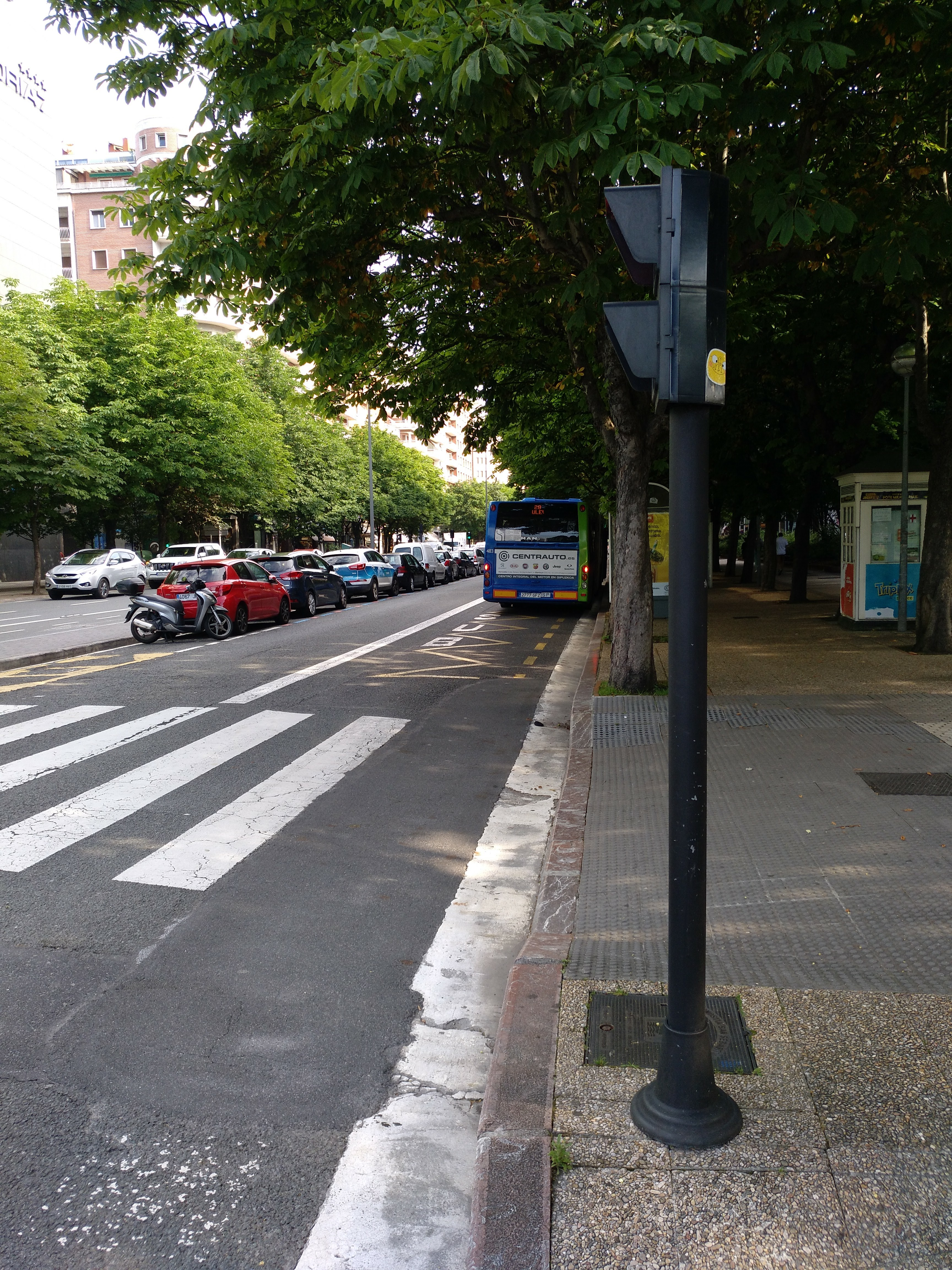 Autobús urbano doble de d·bus en San Sebastián en la avenida Sancho el Sabio